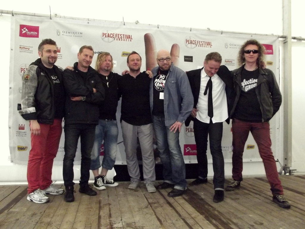 "Poparzeni Kawą Trzy", zdjęcie zrobione podczas pierwszego dnia czwartej edycji Life Festival 2013 w Oświęcimiu. Od lewej: ?, Wojciech Jagielski, ?, Roman Osica, ?, Jacek Kret, Mariusz Gierszewski .